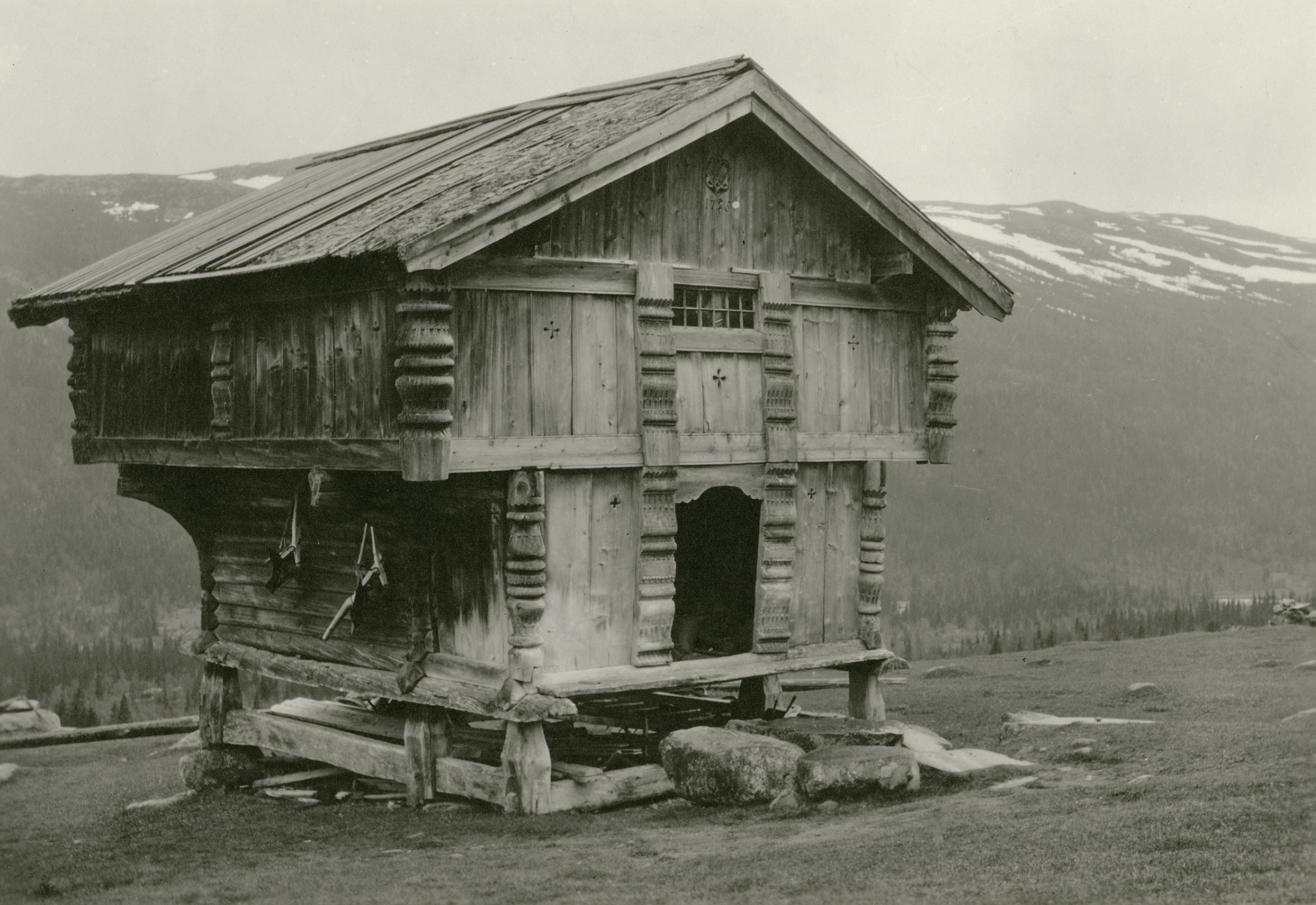 Midtbøen i Austbygd, Telemark